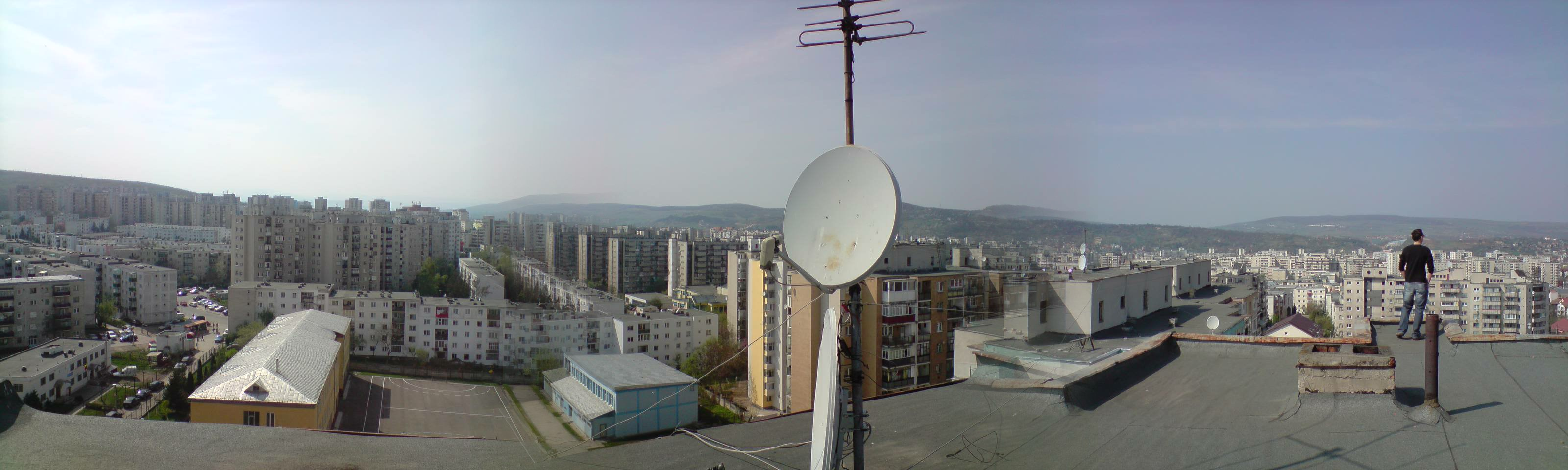 Kolozsmonostori Panoráma